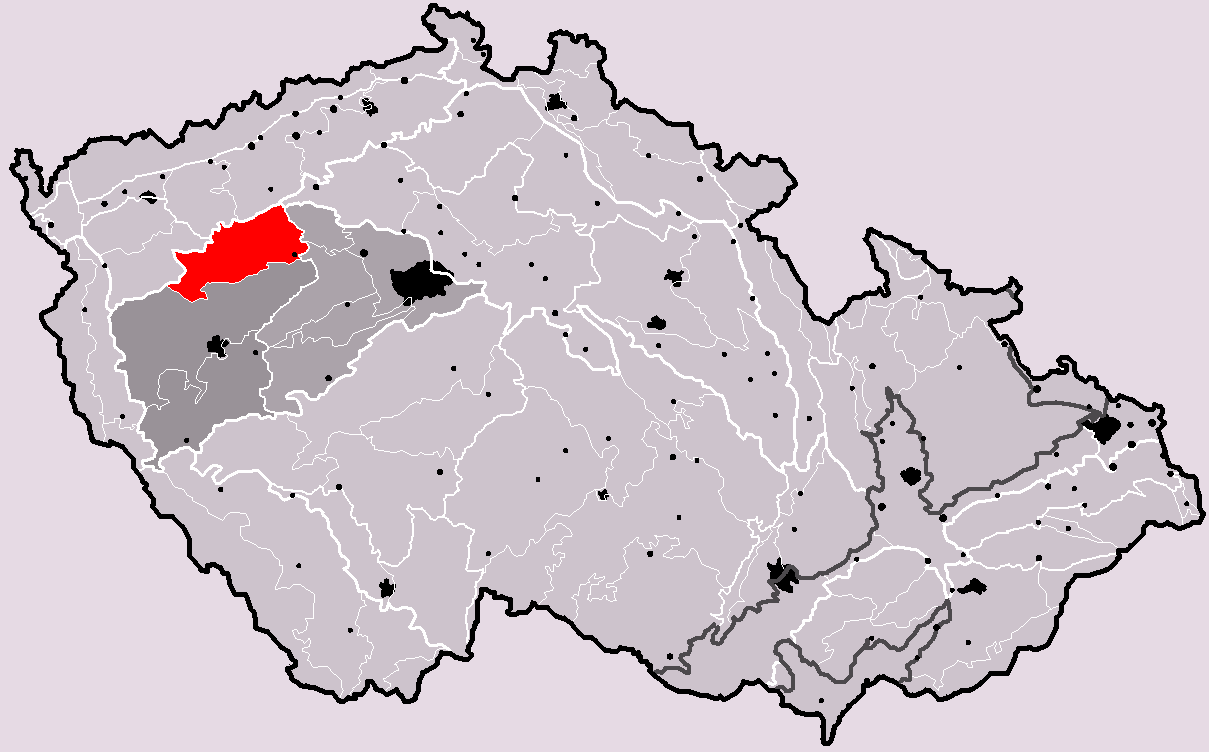 Poloha geomorfologického celku Rakovnická pahorkatina v rámci České republiky. Hercynský systém Hercynská pohoří I Česká vysočina I5 (V) Poberounská subprovincie I5B (VB) Plzeňská pahorkatina I5B-1 (VB-1) Rakovnická pahorkatina